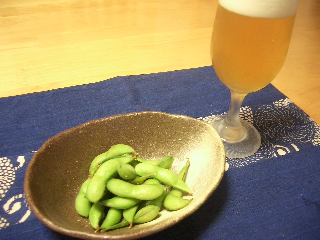 夏と言えば、枝豆とビールでしょう。と言う私は、下戸ですが（笑）枝豆は大好き♪